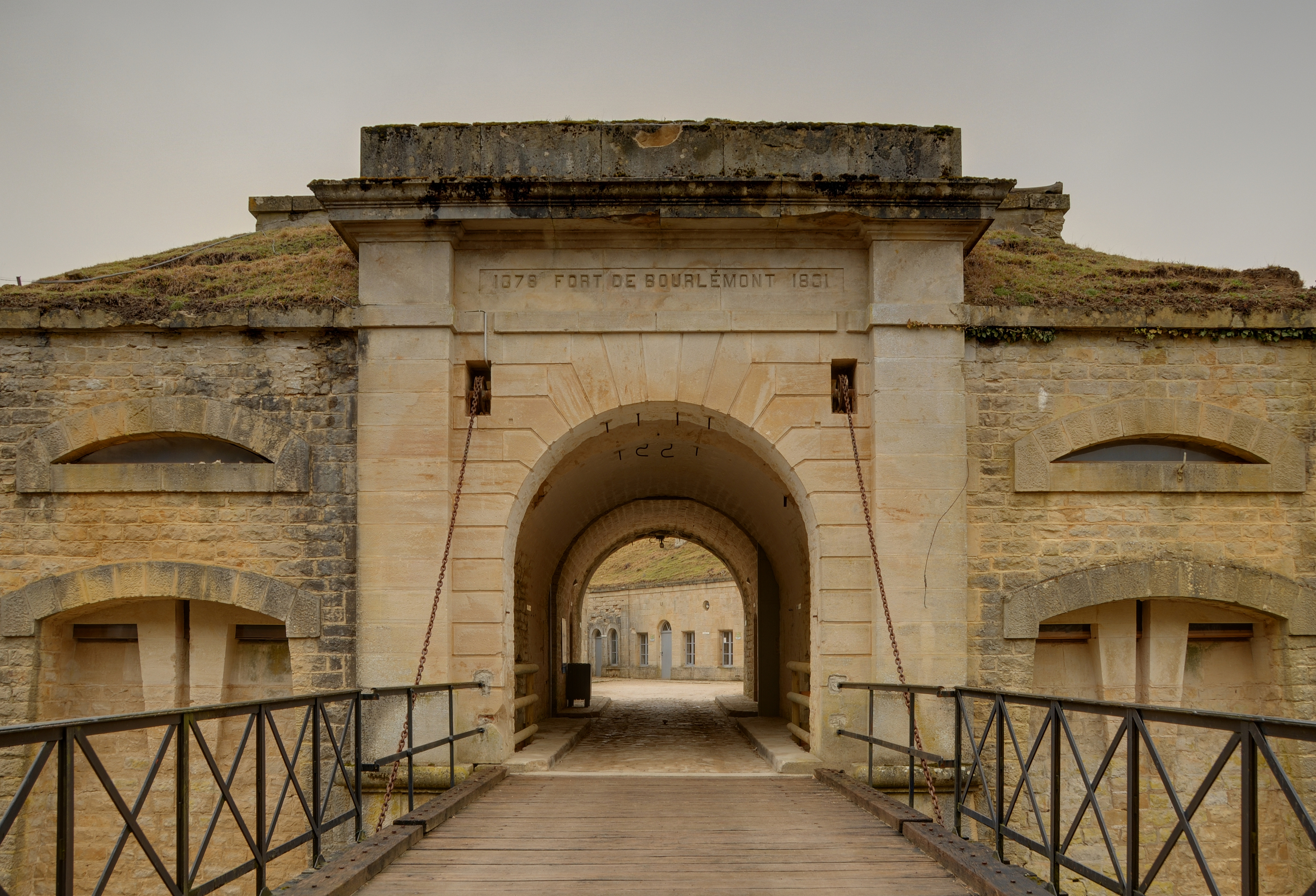 Entrée principale. Bourlémont Fortifications (HDR).